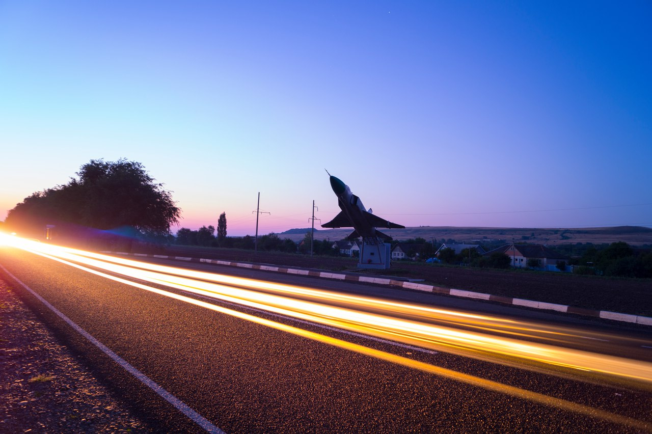 Вид на самолет в с. Шишкино во время рассвета.